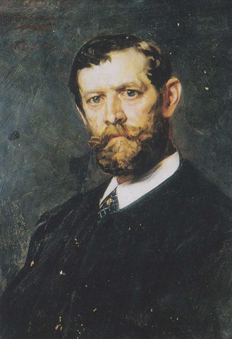 Alfred Izydor Römer